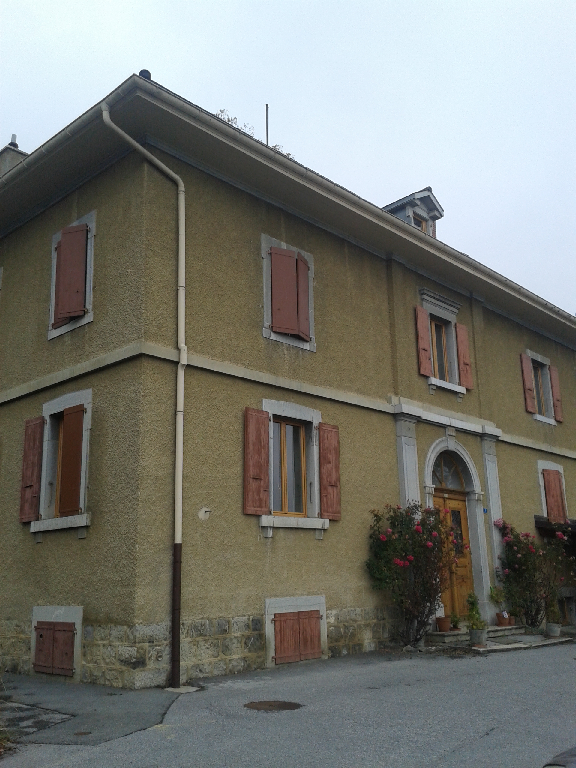 Ba'timent situé sur la place du collège et du temple, au bout de la ruelle du collège.